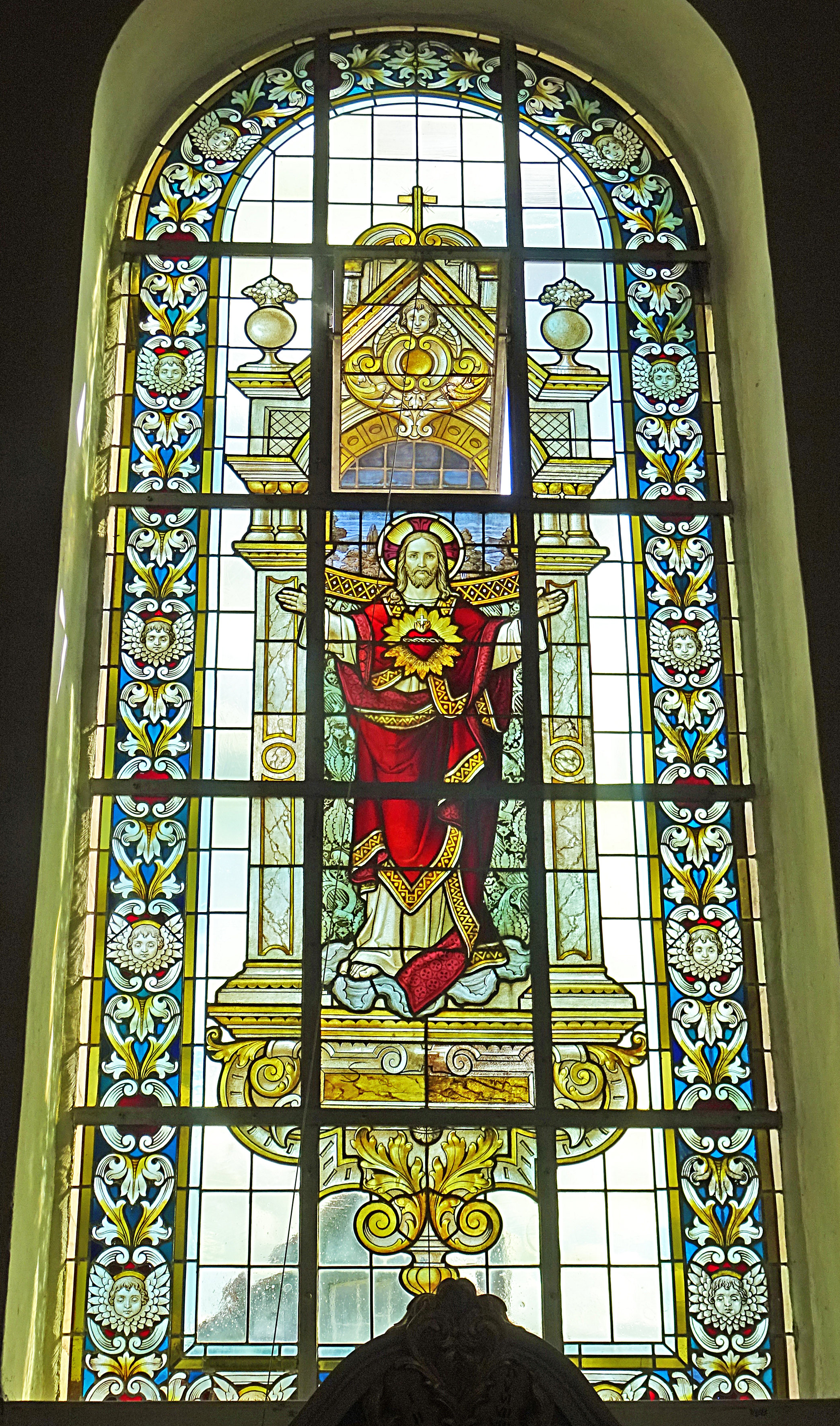 Buntglasfenster in der Dorfkirche St. Bartholomäus (Hohengandern)